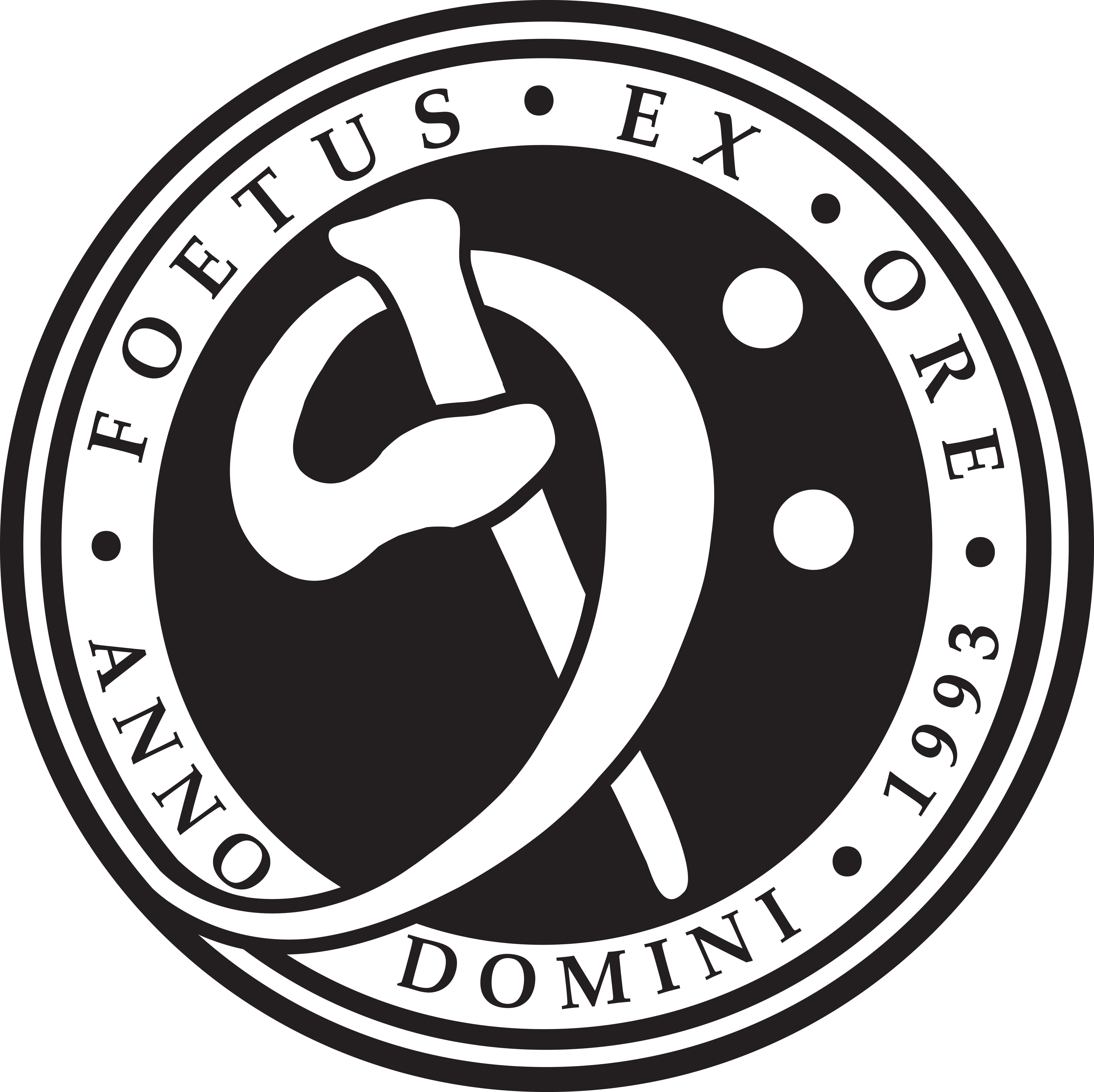 Logoen til Foetus Ex Ore, mannskoret ved Det medisinske fakultet, NTNU.